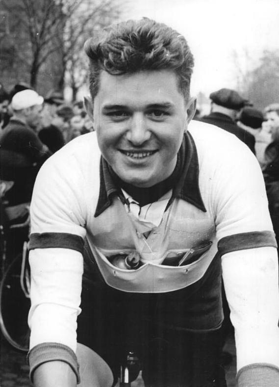 Emil Reinecke Zentralbild SBA 1399.A.-V. 13.4.1955 Kandidaten der DDR-Mannschaft für die VIII. Internationale Radfernfahrt für den Frieden Prag-Berlin-Warschau Rail Reinecke Deutsche Hochschule für Körperkultur, Leipzig.